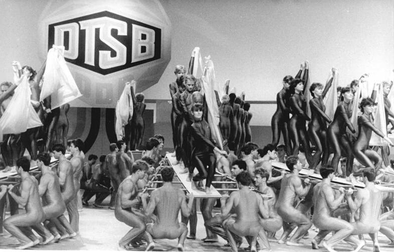 Berlin, 90. IOC-Session, Eröffnung, Generalprobe ADN-ZB Mittelstädt 5.6.85 Berlin: 90. IOC-Session -Mut, Kraft und Geschicklichkeit dokumentieren Dynamosportler bei ihren Vorführungen auf dem "Festlichen Programm" im Palast der Republik anläßlich der IOC-Session. (Foto von der Generalprobe)